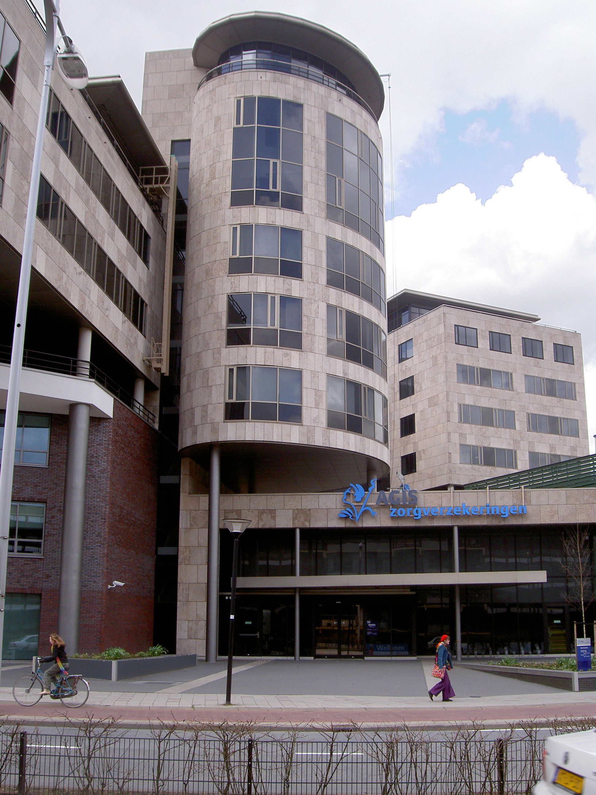 Office building of Agis Zorgverzekeringen, Amersfoort